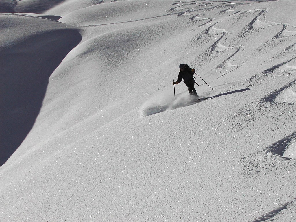 Abfahrt vom Hasenflüeli 2412m (Prättigau, CH)